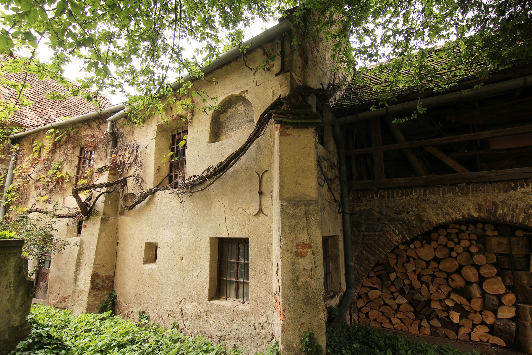 Incintă fortificată interioară 02